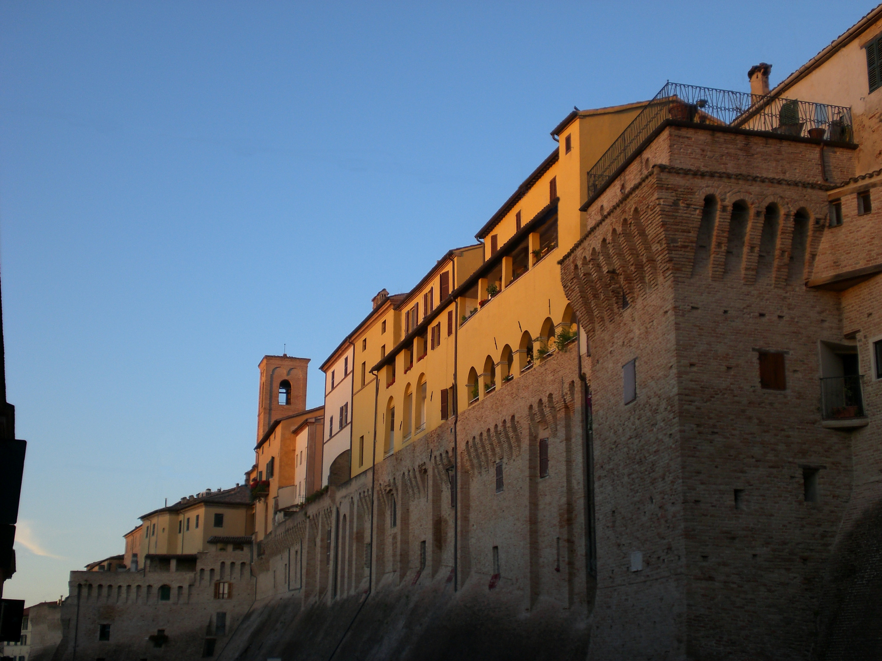 Jesi, Mura occidentali, Francesco di Giorgio Martini, XV secolo.